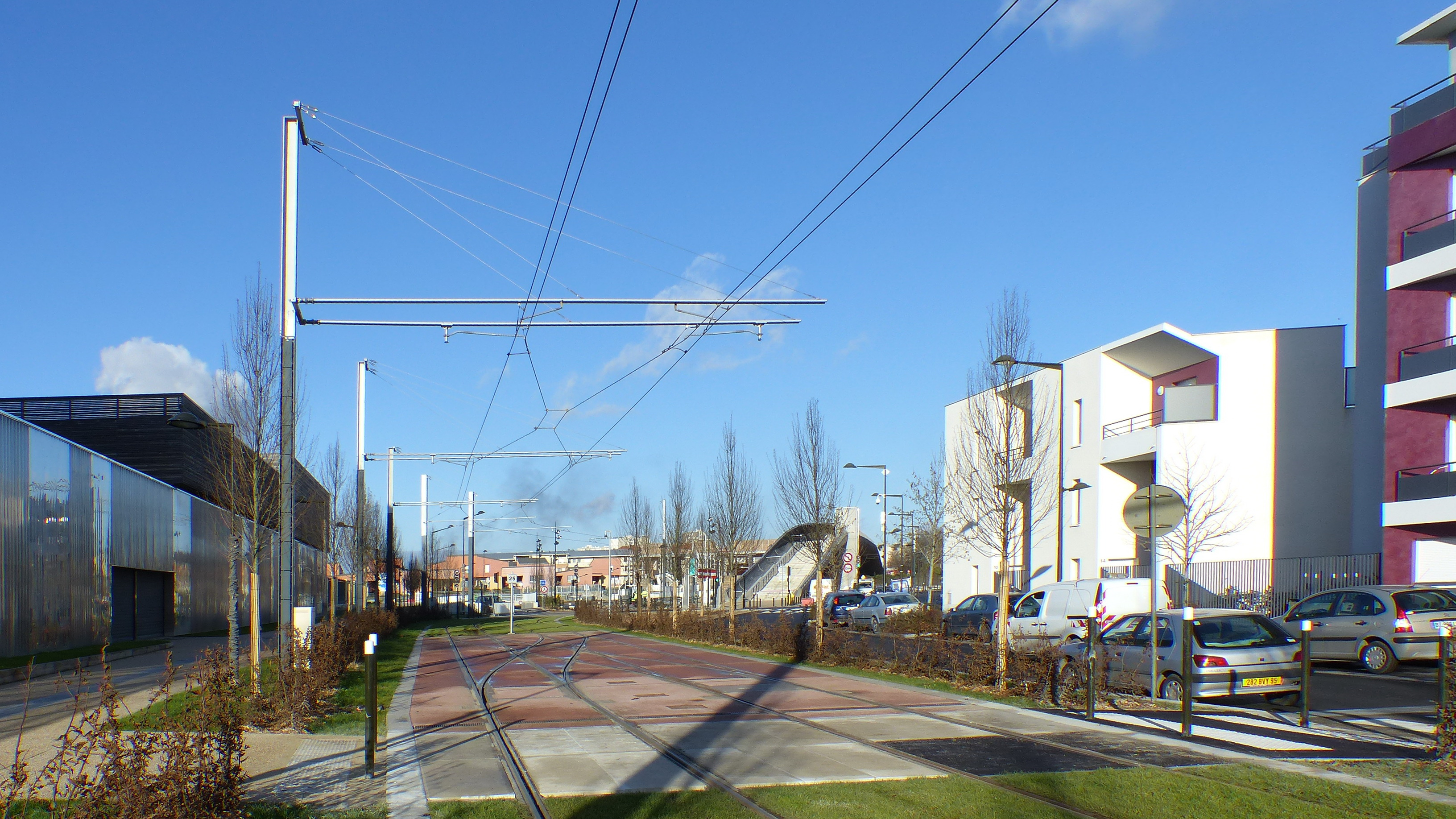 Rue de l'Université à Villetaneuse : A gauche, la façade du gymnase universitaire Jesse Richardson, puis le trottoir / circulations douces, la plateforme de la ligne T8 au niveau des aiguillages de jonction des deux voies de l'avant-gare de la station terminale Villetaneuse-Université de T8, puis la rue et ses immeubles réalisés pour la Foncière-Logement.Au fond, la passerelle de Villetaneuse, qui permet de franchir la Grande-Ceinture et donnera accès à la Gare de Villetaneuse-Université du Tram Express Nord